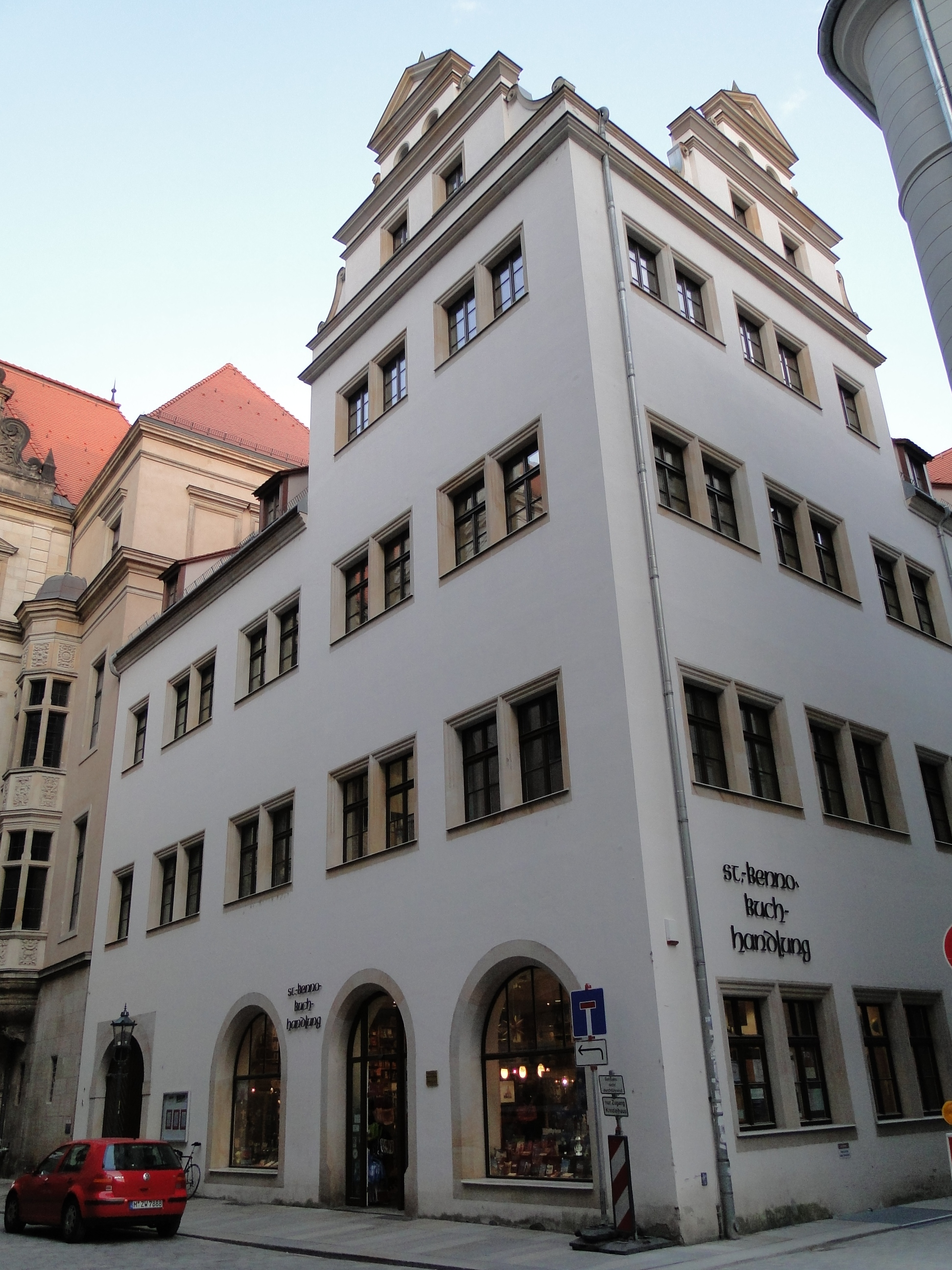 Kanzleihaus in der Schloßstraße 24 Ecke Kanzleigäßchen in Dresden mit der St.-Benno-Buchhandlung